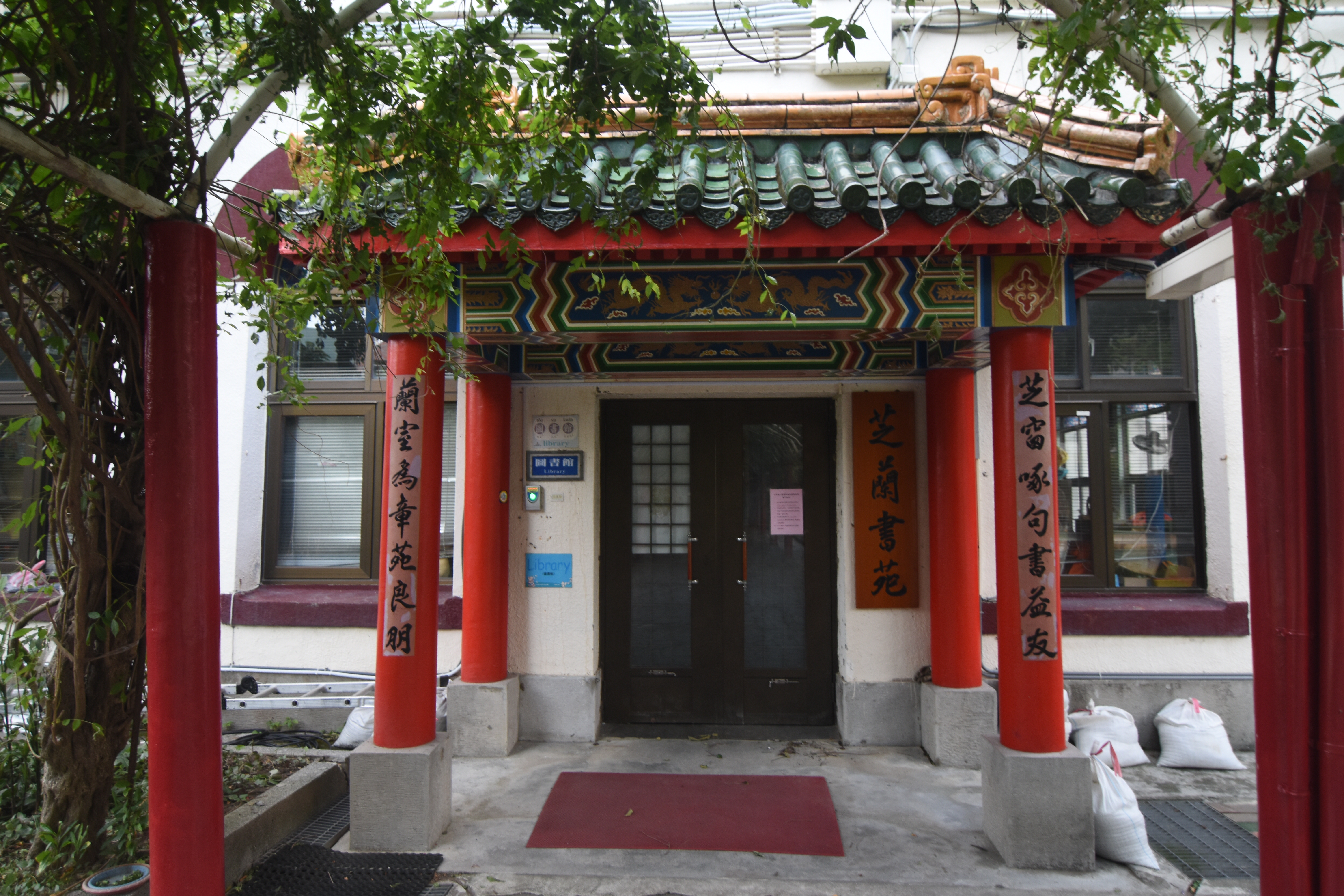 中文（台灣）: 原八芝蘭公學校講堂本建築為興建於大正5年(1916)之磚造校舍，是目前校園內唯一留存之日據時期的建築，見證士林國小百餘年的學校發展歷史，在教育史上具有重要意義。